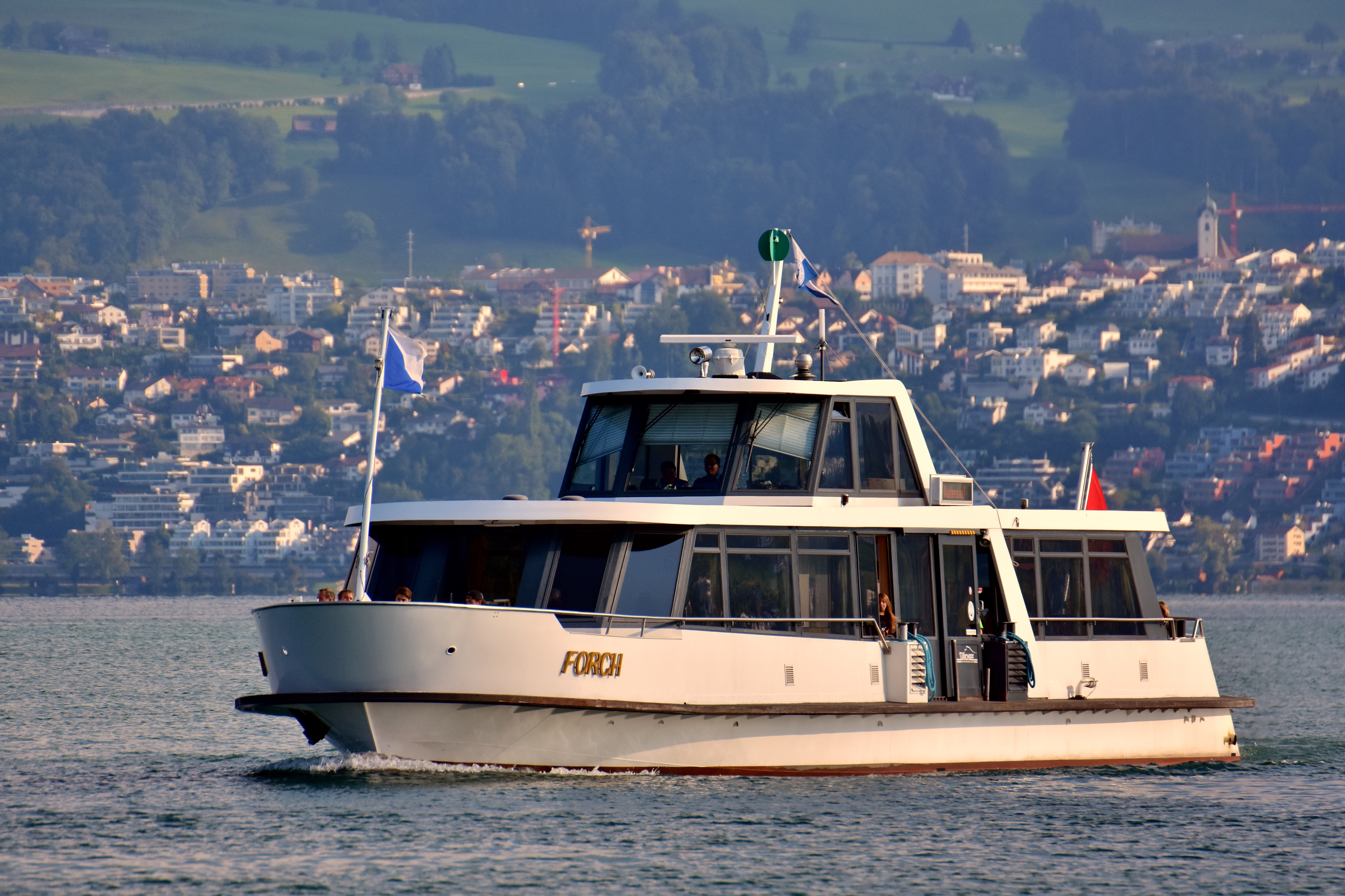 Zürichsee-Schifffahrtsgesellschaft (ZSG) motorboat MS Forch as seen from ZSG ship MS Helvetia on Zürichsee in Switzerland